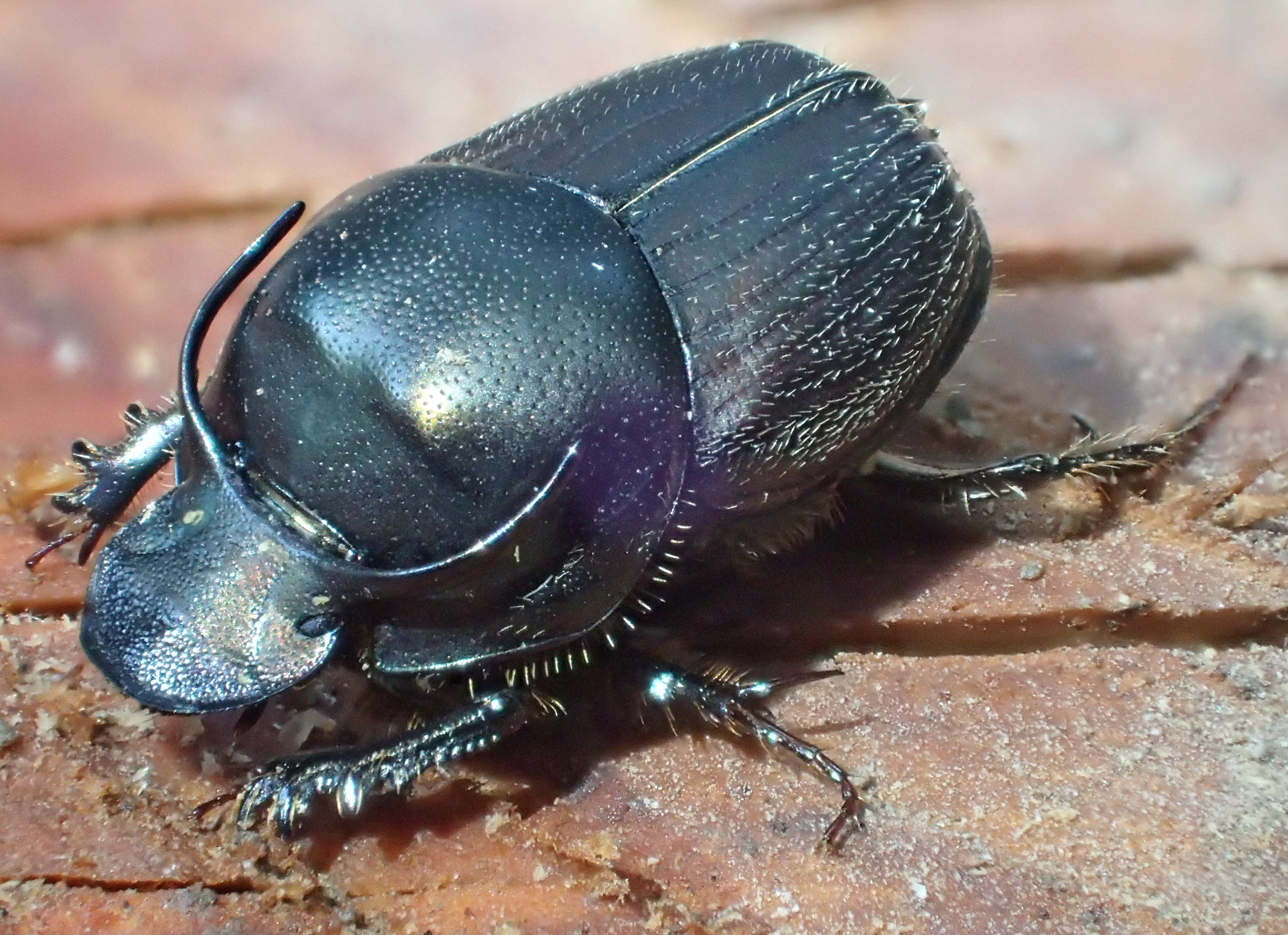 Onthophagus illyricus aus Griechenland, Peloponnes, nordwestlich von Tripolis